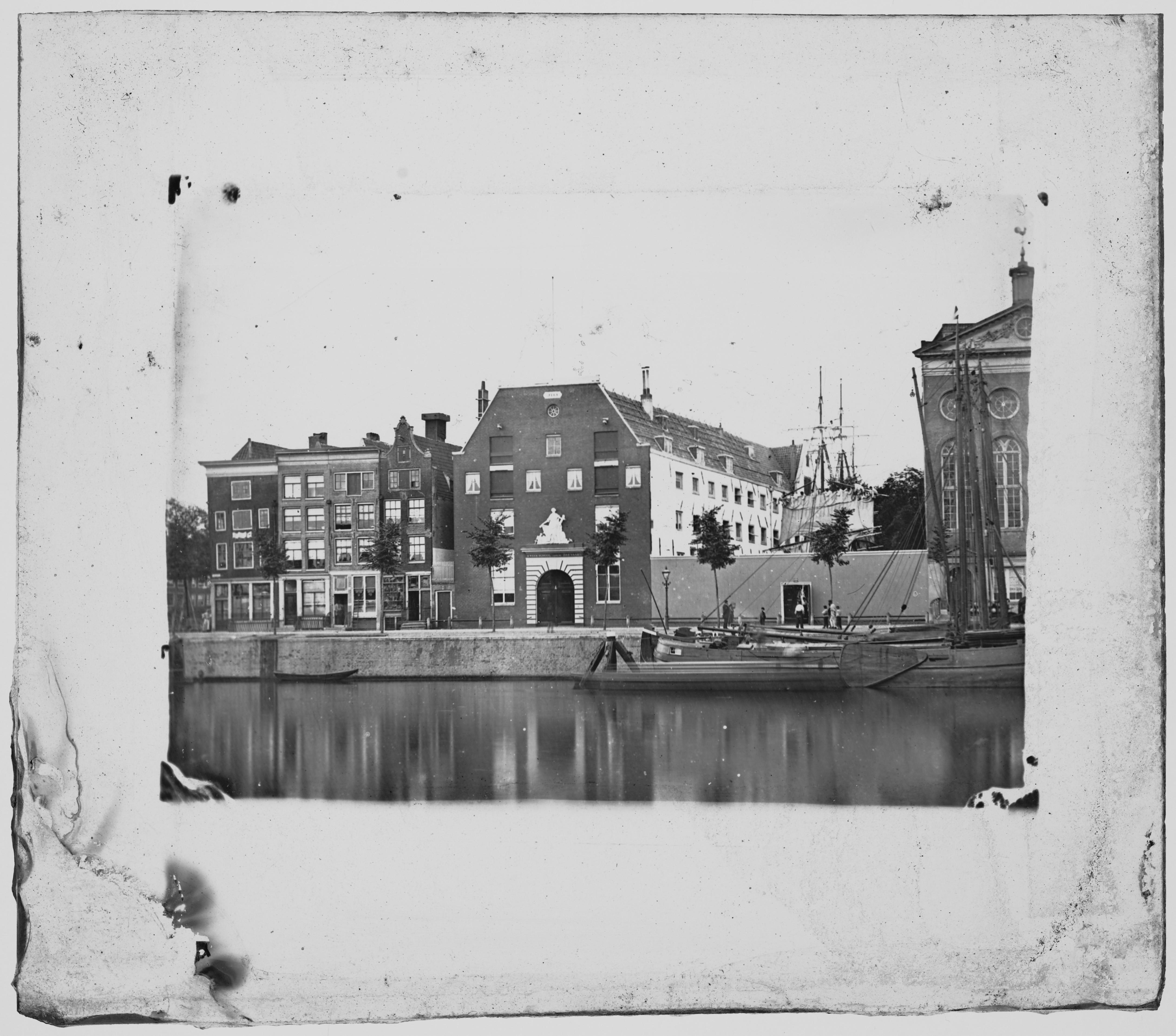 Beschrijving IJgracht 31-35 (v.r.n.l.) met op nummer 31 's Rijks Kweekschool voor de Zeevaart Op deze plaats verrees tussen 1878 en 1880 de nieuwe Kweekschool, Prins Hendrikkade 189 hoek Schippersgracht. Stereosgladia in houten frame. Documenttype foto Vervaardiger Oosterhuis, Pieter Collectie Collectie Stadsarchief Amsterdam: foto-afdrukken Datering 1877 Geografische naam Prins Hendrikkade IJgracht Inventarissen Afbeeldingsbestand ANWI00115000001 Generated with Dememorixer